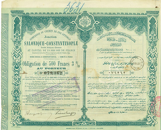 Compagnie du Chemin de Fer Ottoman Jonction Salonique-Constantinople 500 Franken-Obligation